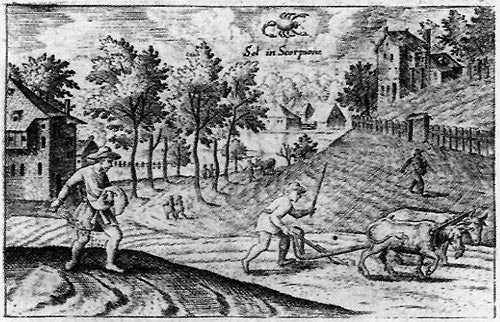 Кастрычнік (з кнігі "Rosarium...")